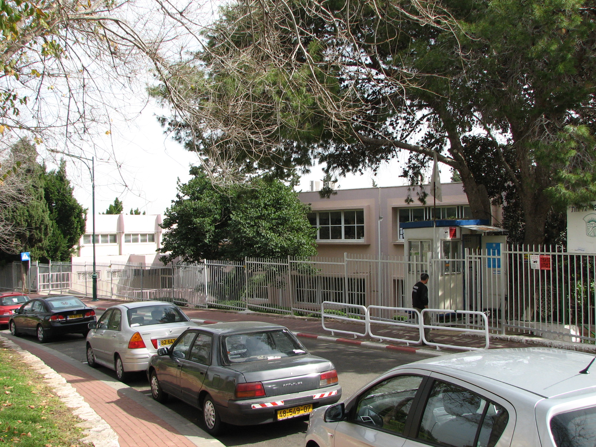 Ben Dor – Suburb in the city Nesher, Israel שכונת בן דור בעיר נשר ליד חיפה בית הספר גלילות